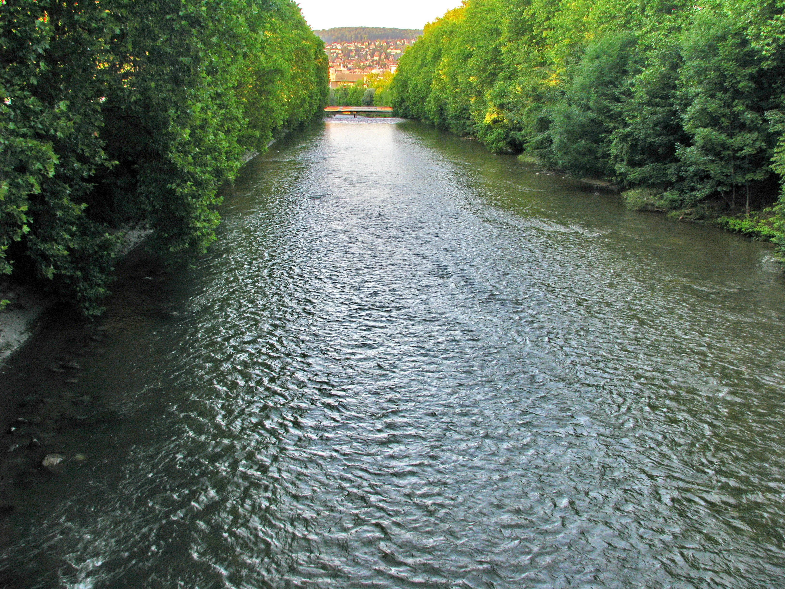 Sihl in Zürich-Sihlfeld, Zürichberg in the background.